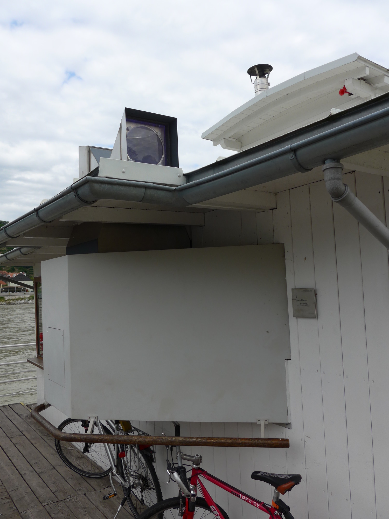 Camera Obscura Installation von Ólafur Elíasson auf der Rollfähre Spitz–Arnsdorf